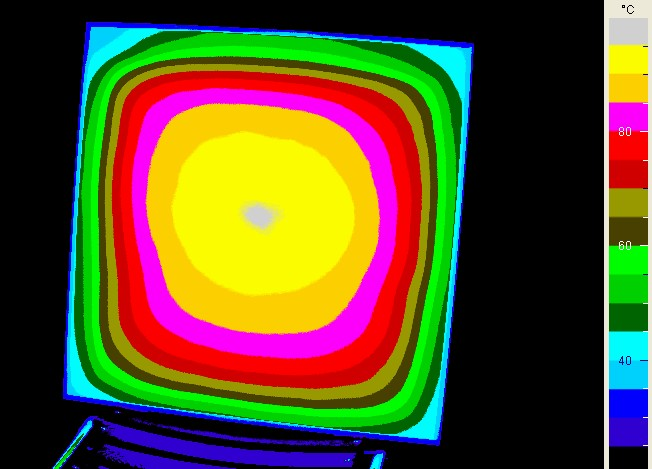 Image thermographique d'un radiateur infrarouge IRL 350 Watt de dimension de 60cm * 60 cm.